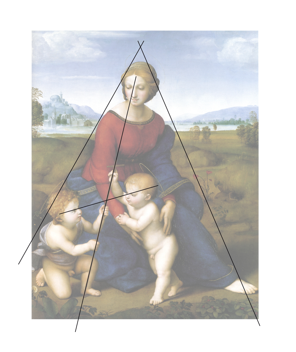 Schéma des lignes de forces sur la Madonna del Prato de Raphaël